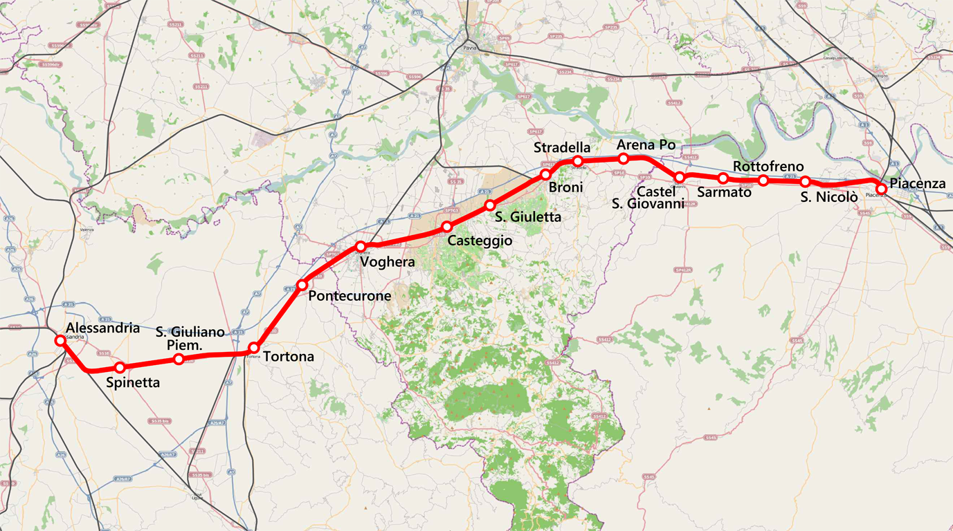 Mappa della ferrovia Alessandria–Piacenza